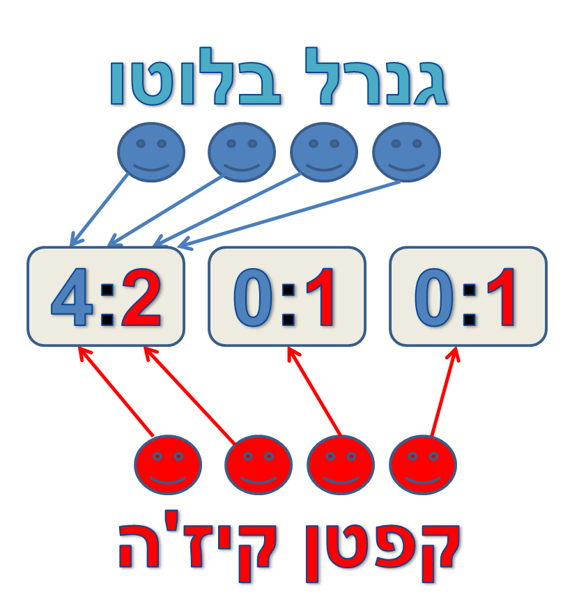 דוגמא למשחק של גנרל בלוטול